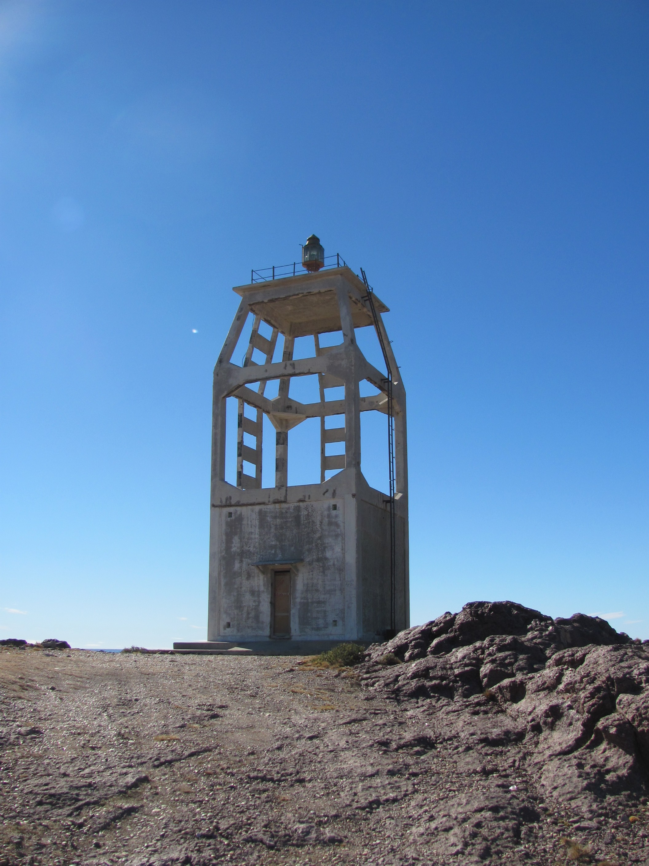 Vista de la entrada del Faro Punta Medanosa